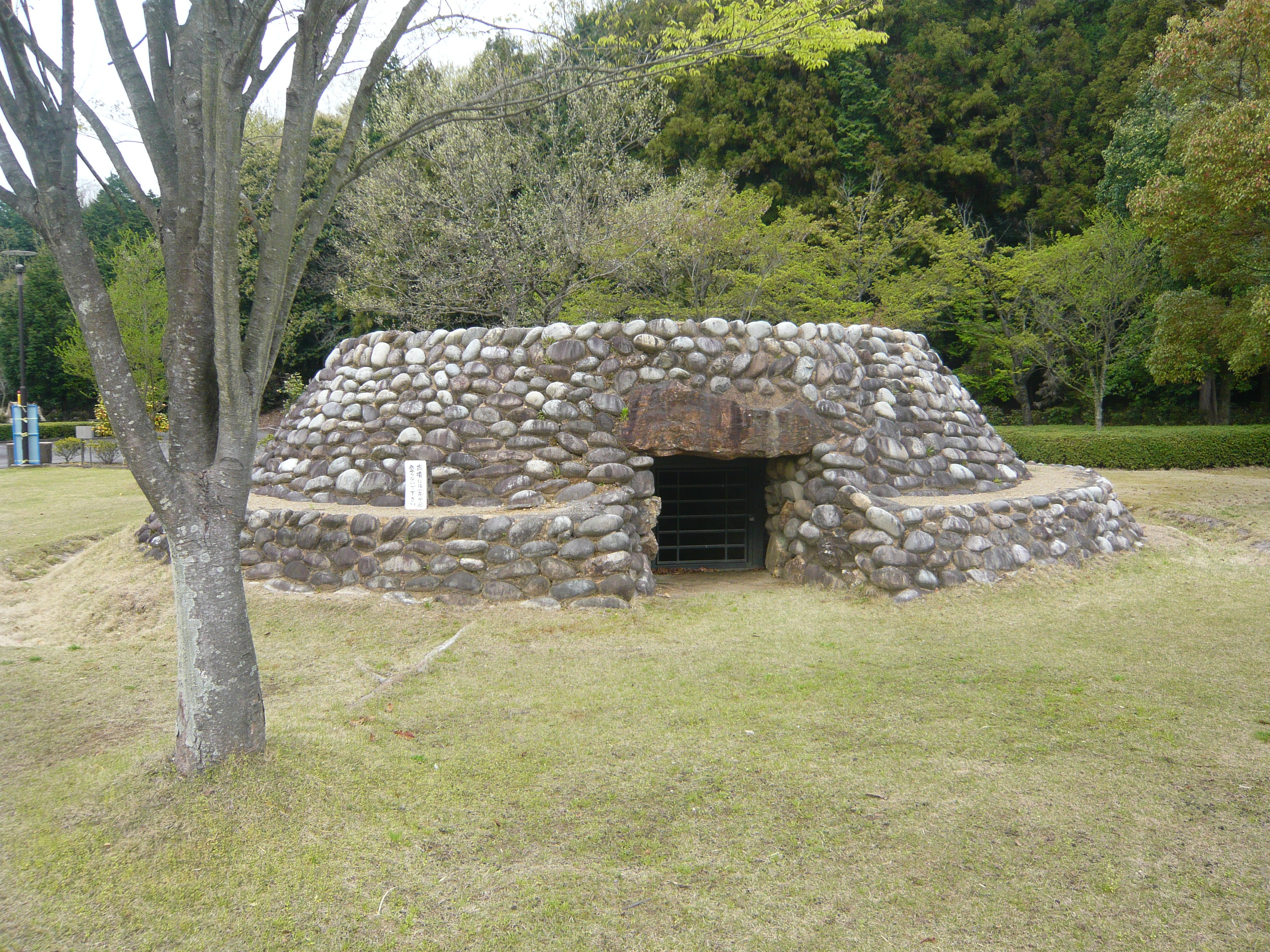 Tsukahara Ruins Park （塚原遺跡公園）,Seki,Gifu,Japan（岐阜県関市）で撮影。